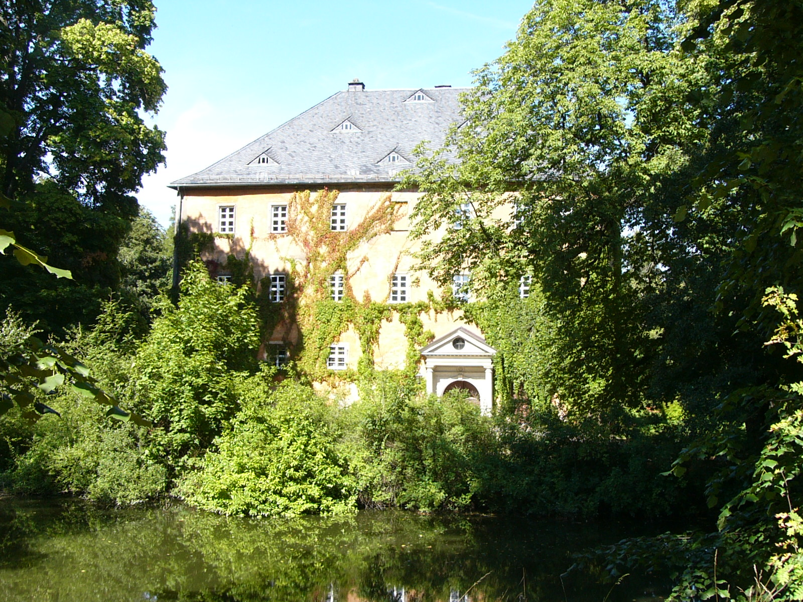 Denkmalgeshütztes Objekt in Weißdorf